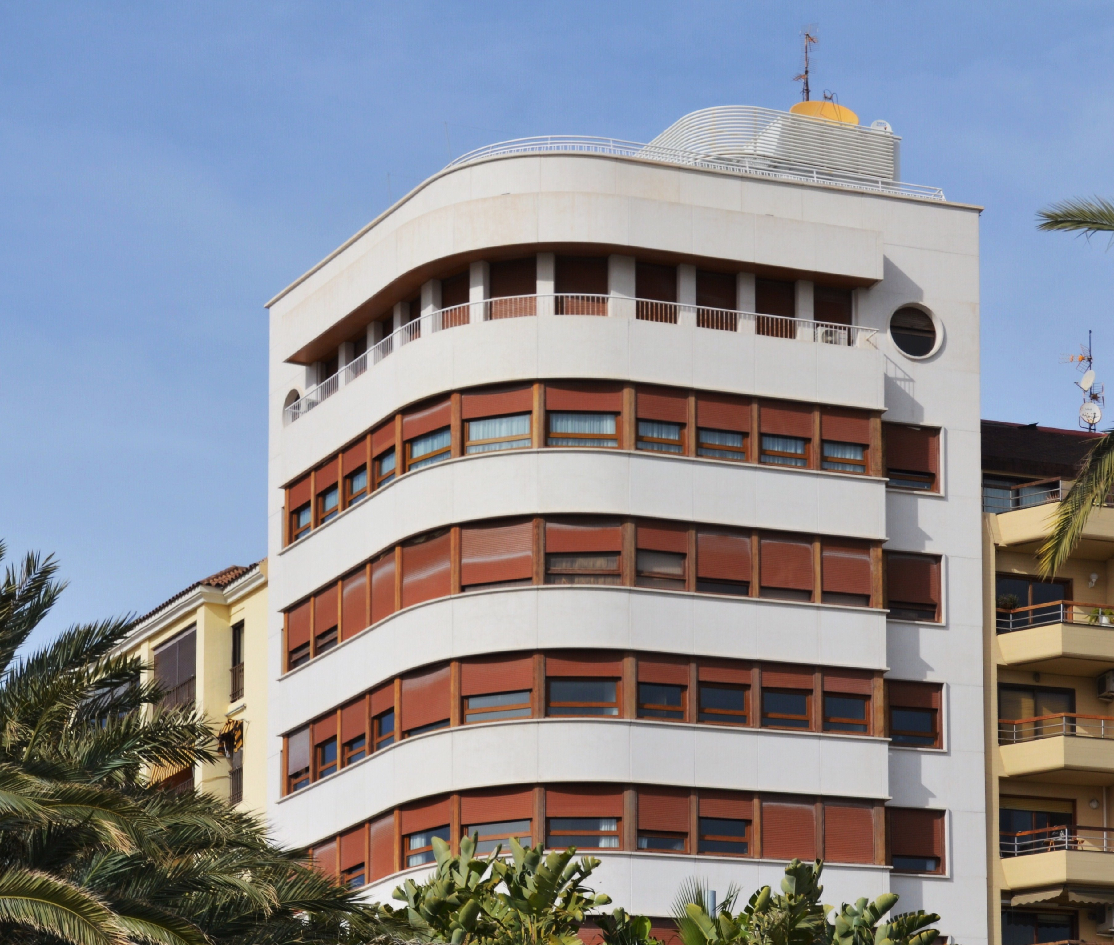 Edifici Galiana, part superior, Alacant.